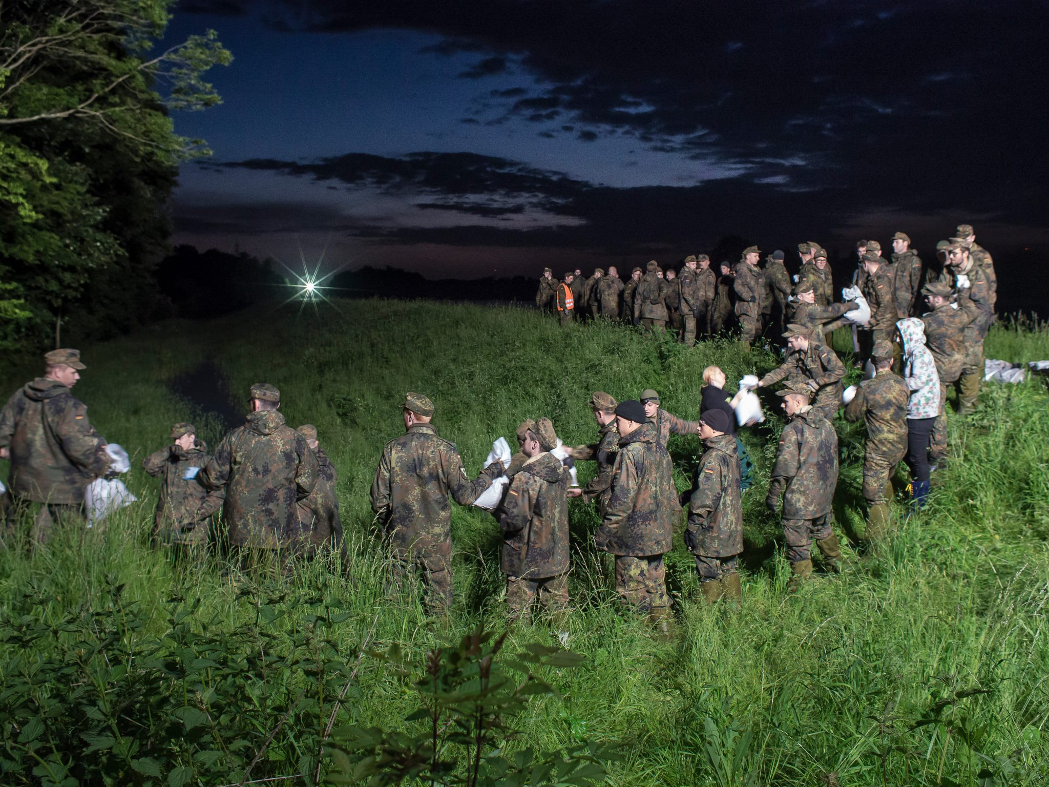 Hochwasser